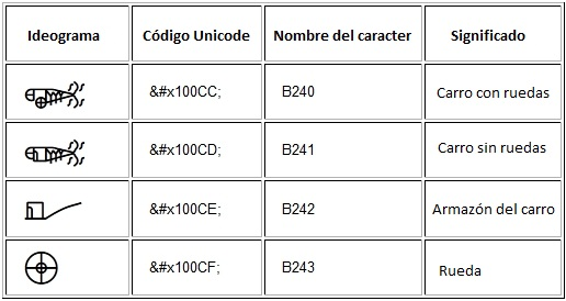 caractères B240 à B243 du linéaire b représentant un char, un char sans roue, un bâti de char et une roue (d'après unicode v5)